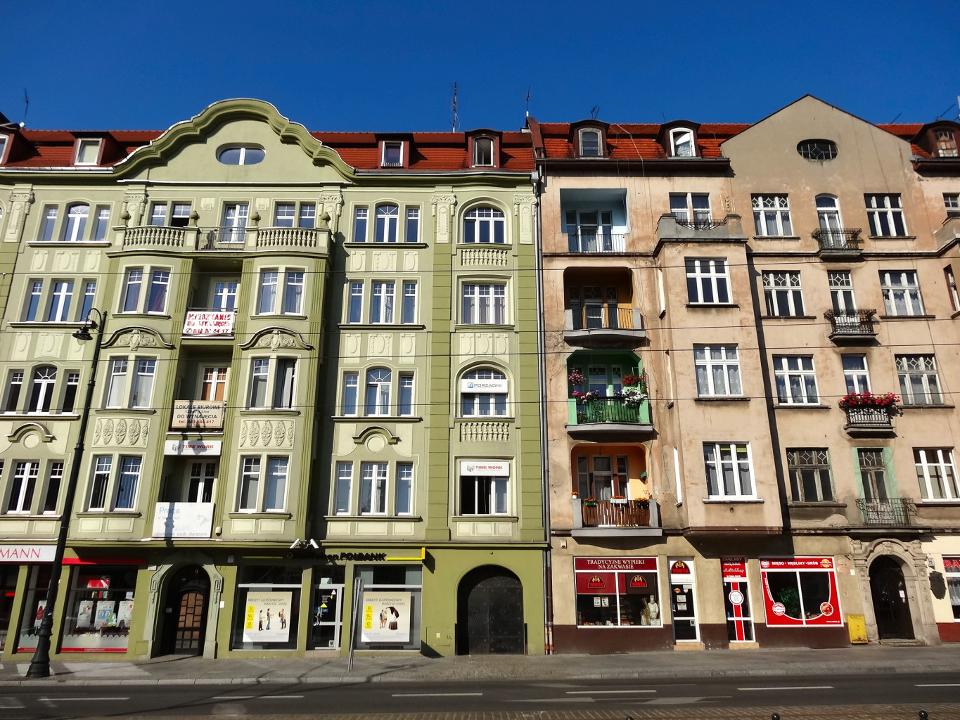 Ulica Dworcowa w Bydgoszczy na odcinku od ul. Królowej Jadwigi do dworca PKP